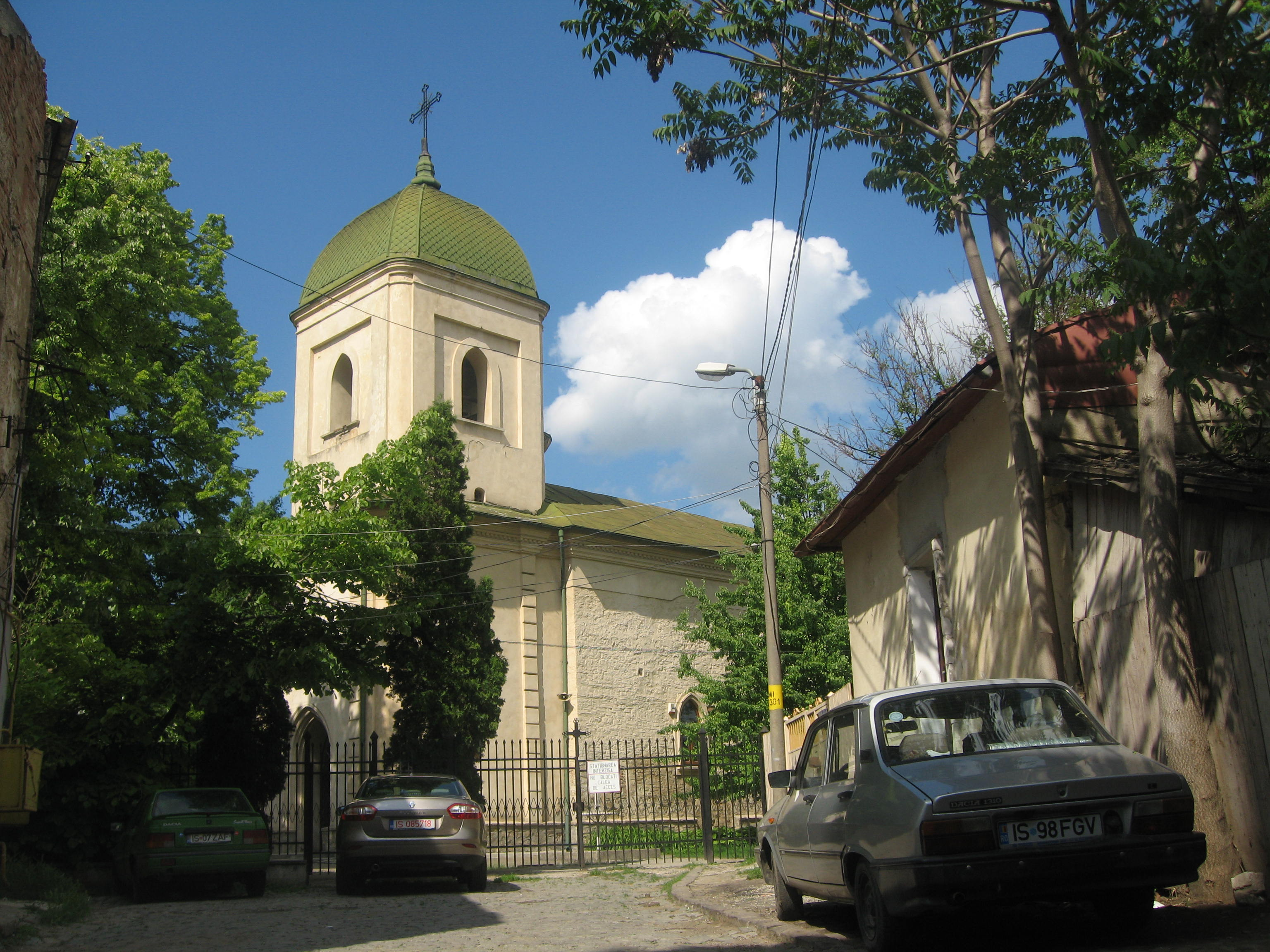 Biserica Sf. Dumitru Bals din Iasi